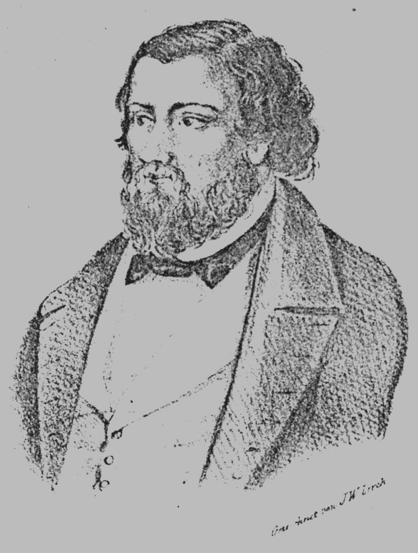 Porträt Zeichnung von Freidrich Neff (1821-1849)